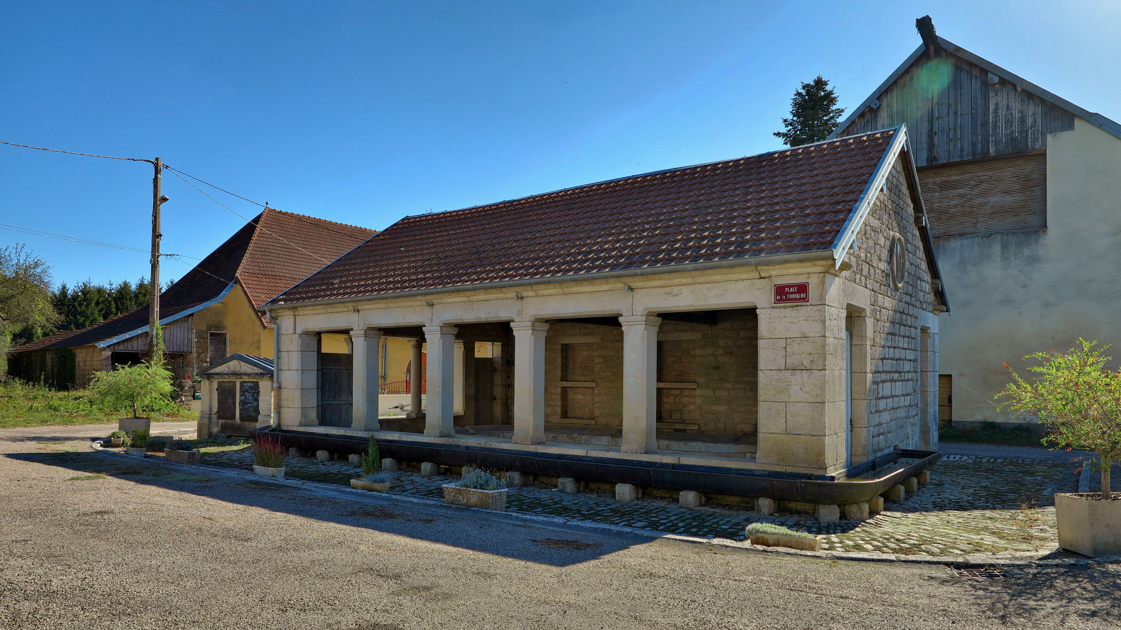 Le lavoir-abreuvoir .